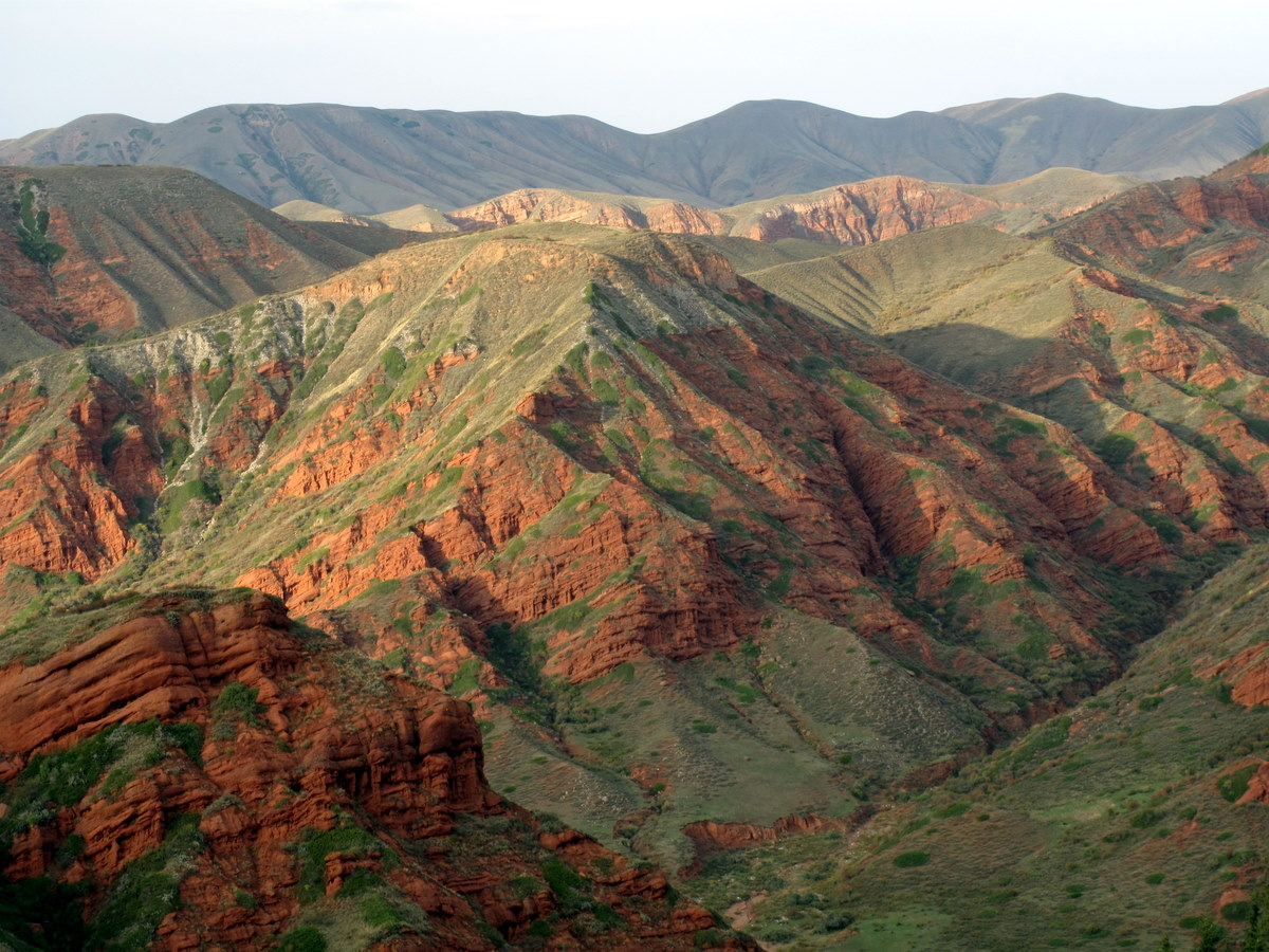 Red Rock Ridge at Djeti-Oguz